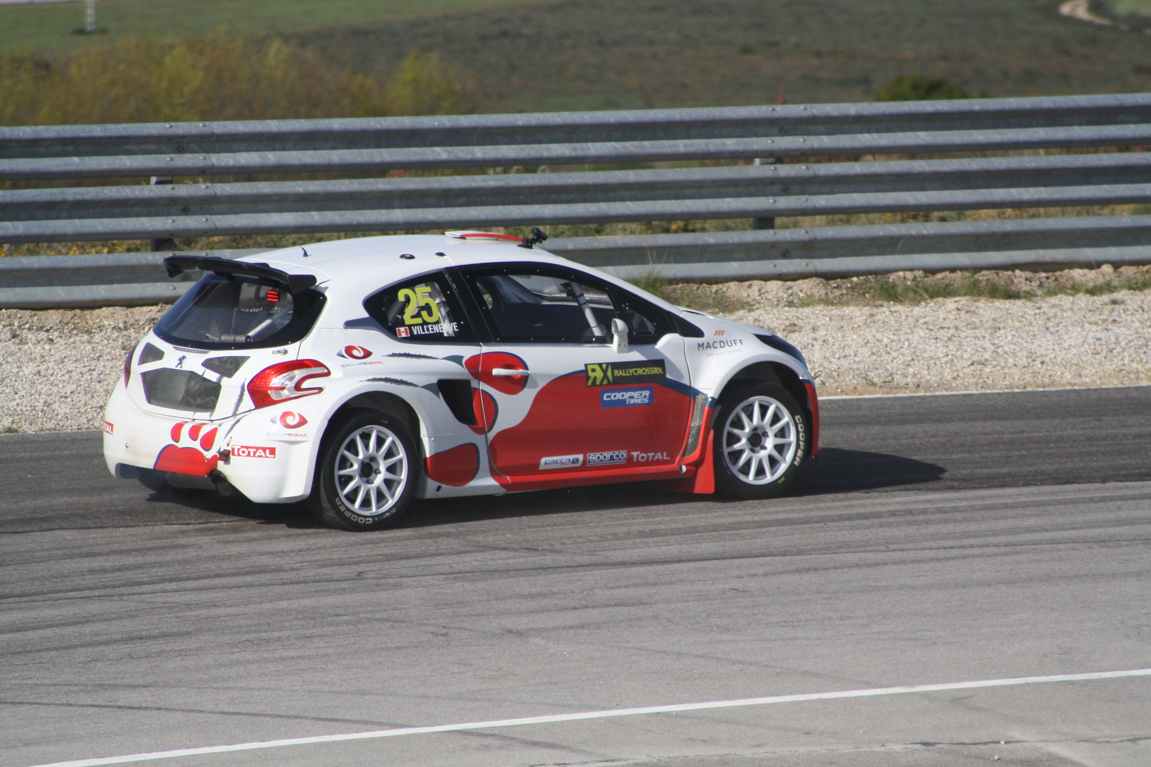 Jacques Villeneuve en Portugal la primera ronda del Campeonato del Mundo de Rallycross.